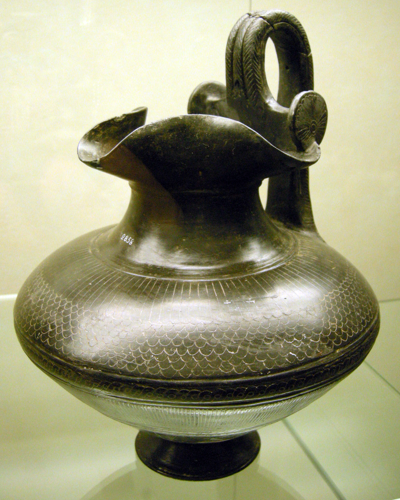 Oinochoe in bucchero, Etruria meridionale, fine VII / inizio VI secolo sec. a.C. Museo archeologico di Firenze.